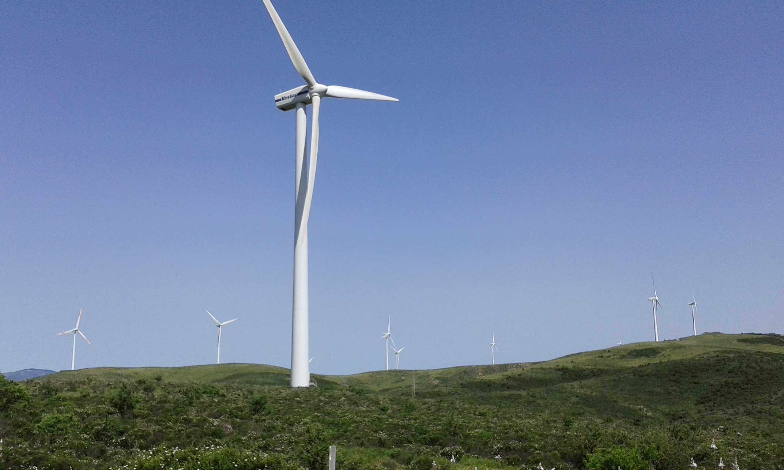 Pala Eolica nel territorio di Ulassai